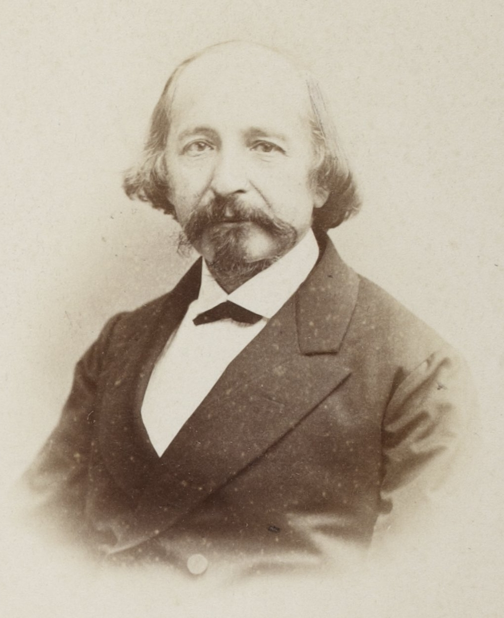 Wilhelm Koner 1869, Aufnahme von Otto Lindner, Berlin